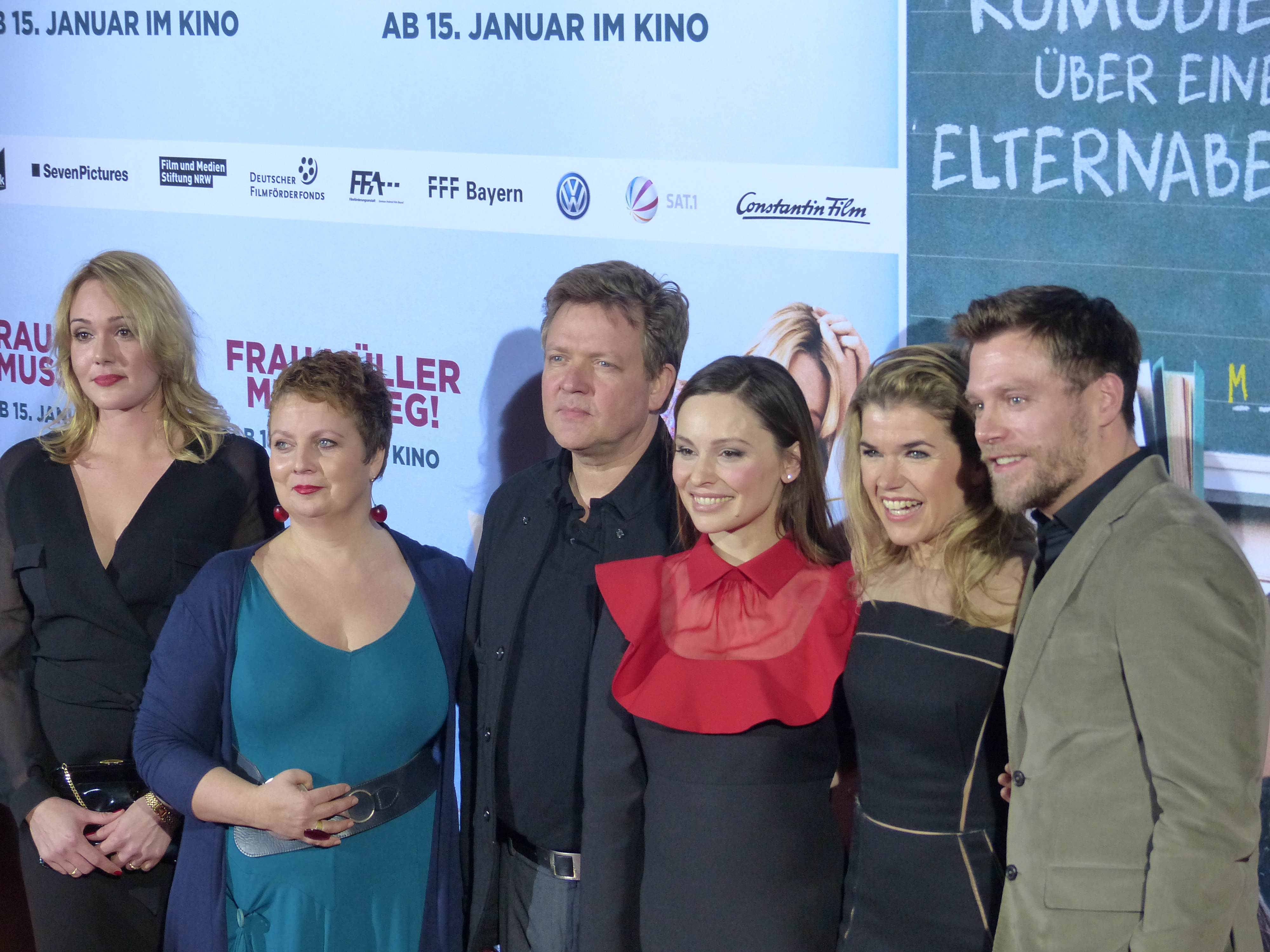 Alwara Höfels, Gabriela Maria Schmeide, Justus von Dohnányi, Mina Tander, Anke Engelke und Ken Duken bei der Kinopremiere von "Frau Müller muss weg", Januar 2015, Cinedom Köln